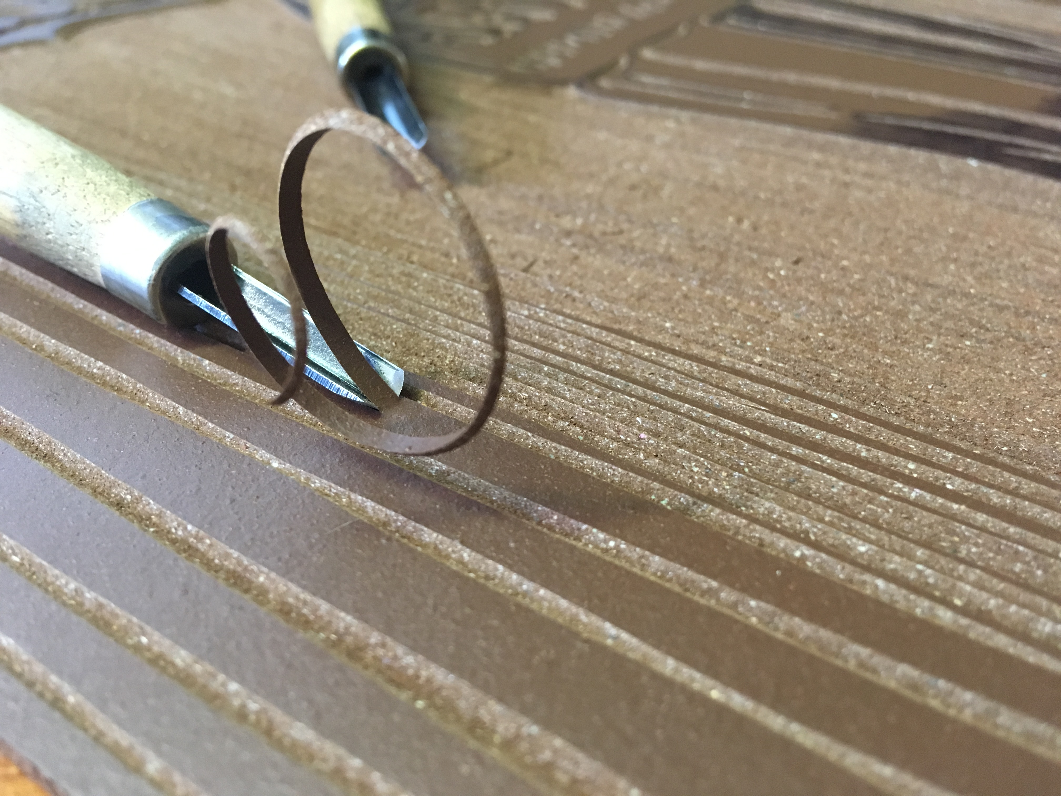 Il Materiale Linoleum adatto per l’incisione, viene solitamente utilizzato per linoleumgrafia che consiste, nell’incidere con sgorbie la matrice risparmiando in rilievo le parti che delineano l’immagine.